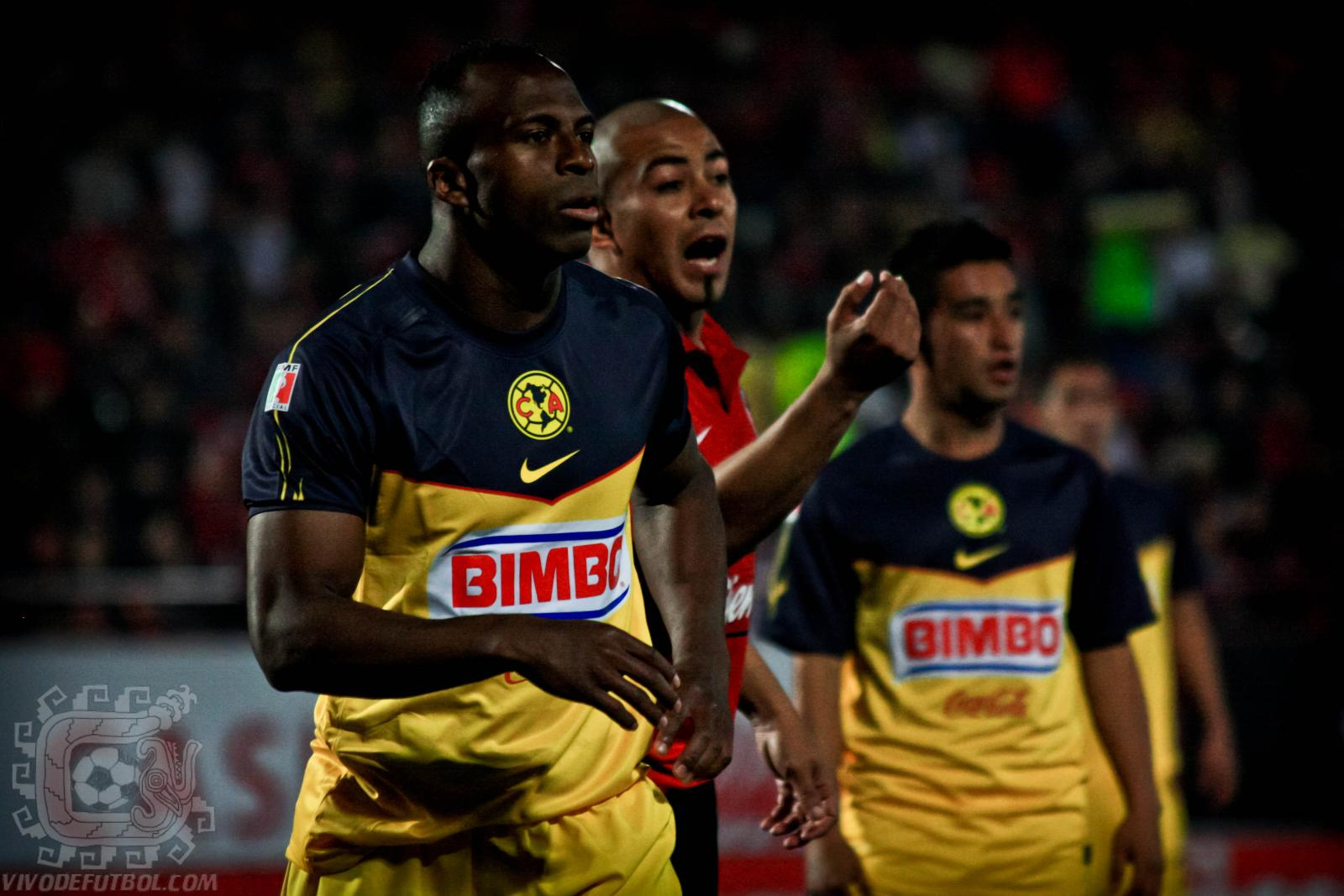 xolos de tijuana vs america